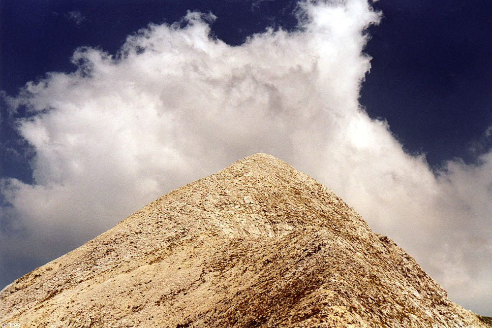 Particolare della vetta del Monte Tambura